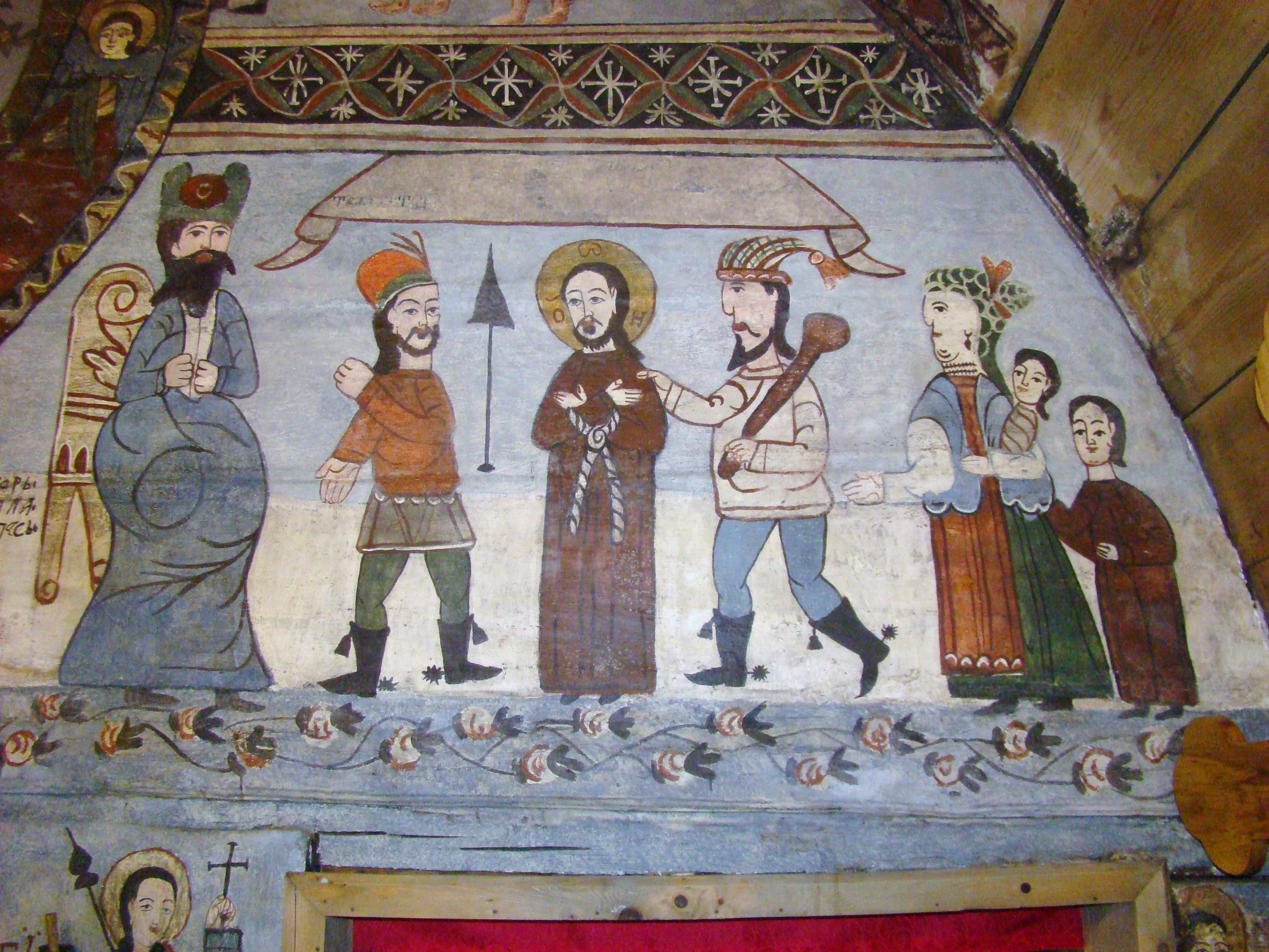 Biserica de lemn „Sf. Arhangheli Mihail şi Gavriil" din Tăuți, județul Cluj